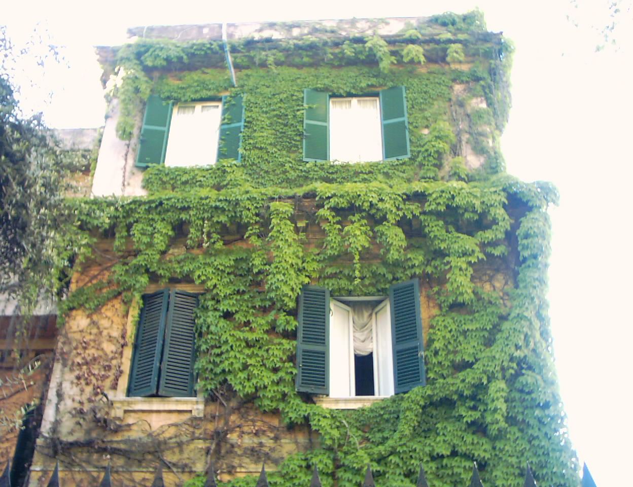 Villino coperto da rampicanti - Quartiere Coppedè